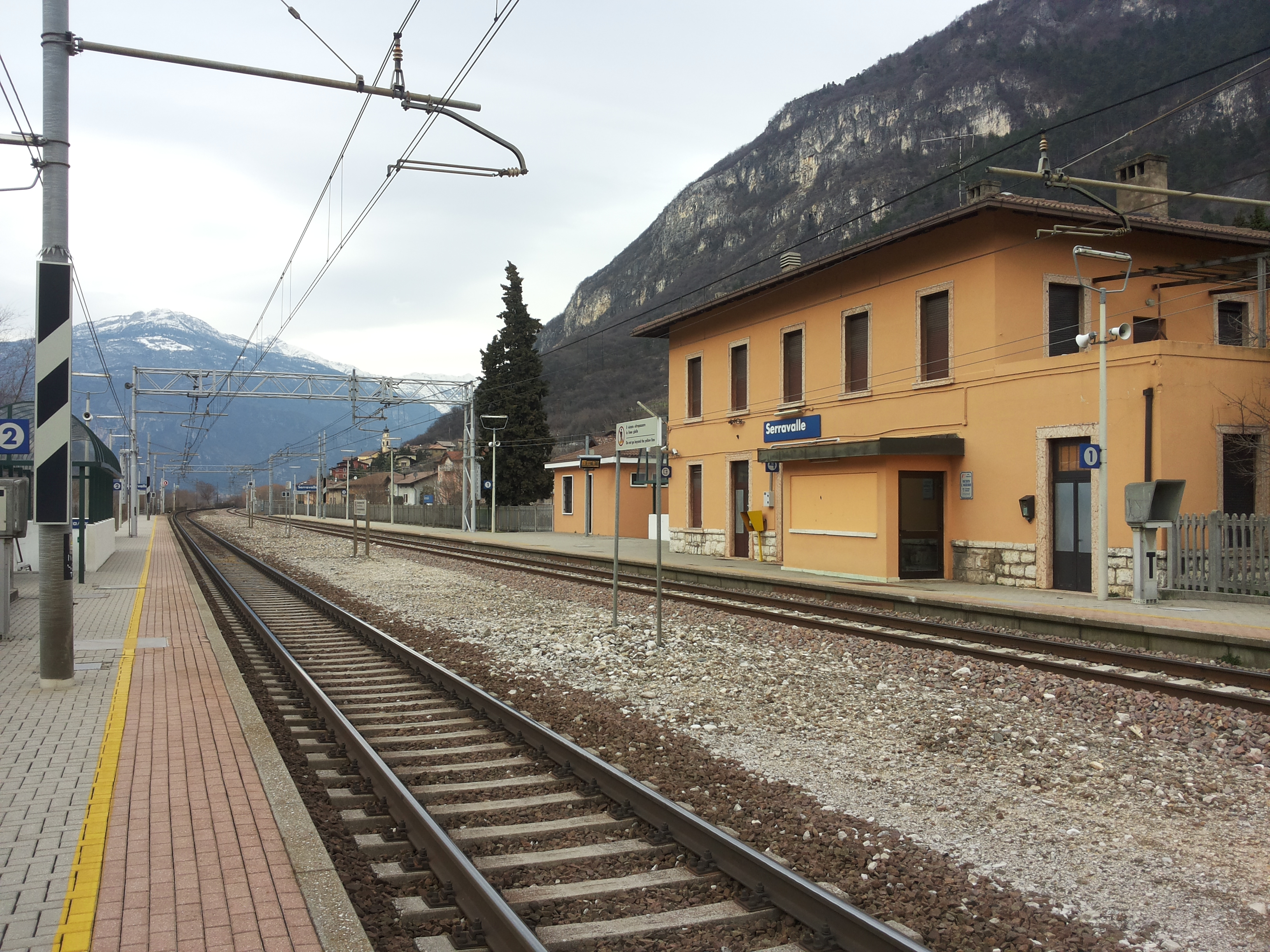 Stazione ferroviaria di Serravalle all'Adige